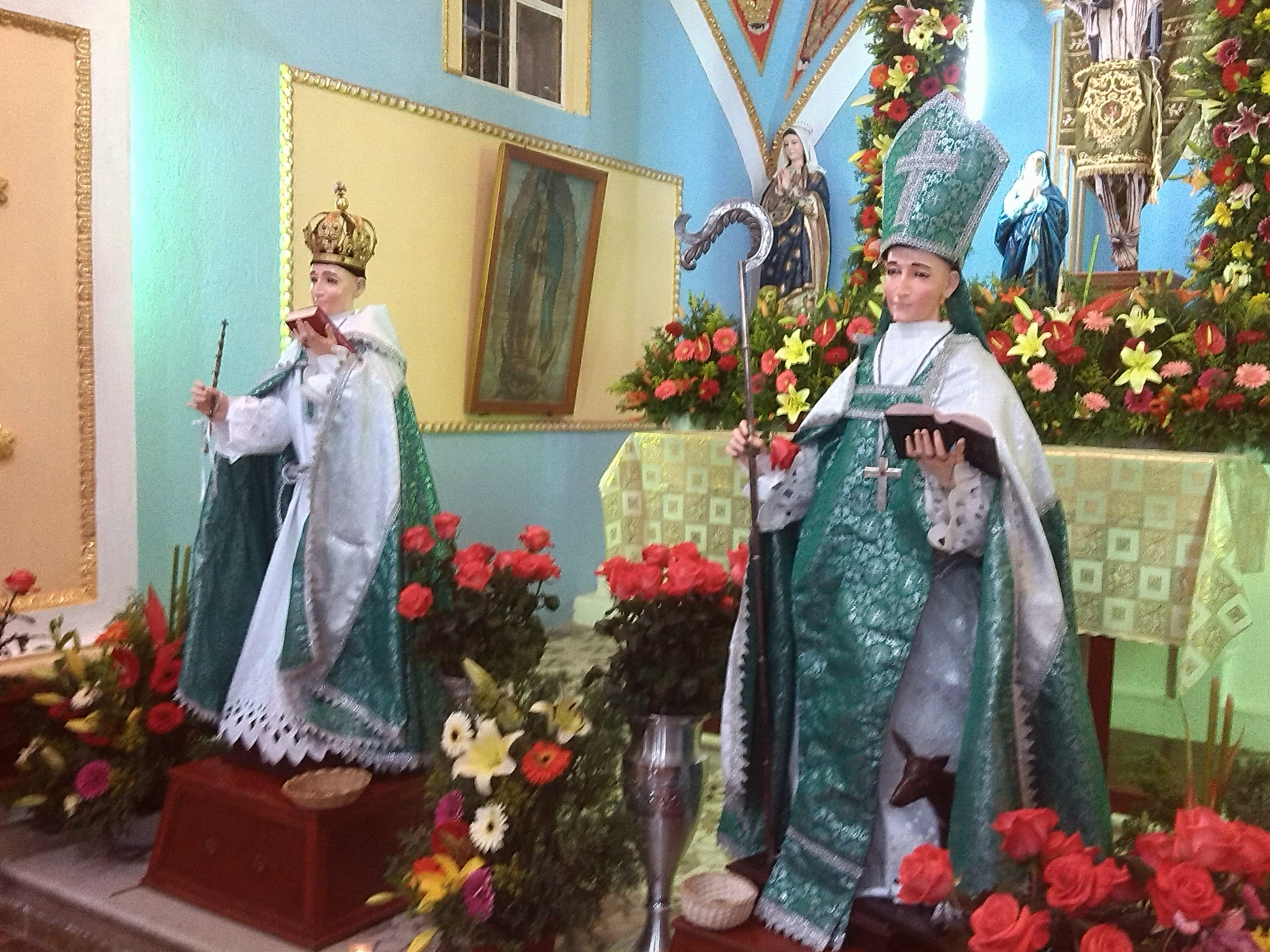 San Luis Obispo de Tolosa y San Luis Rey de Francia